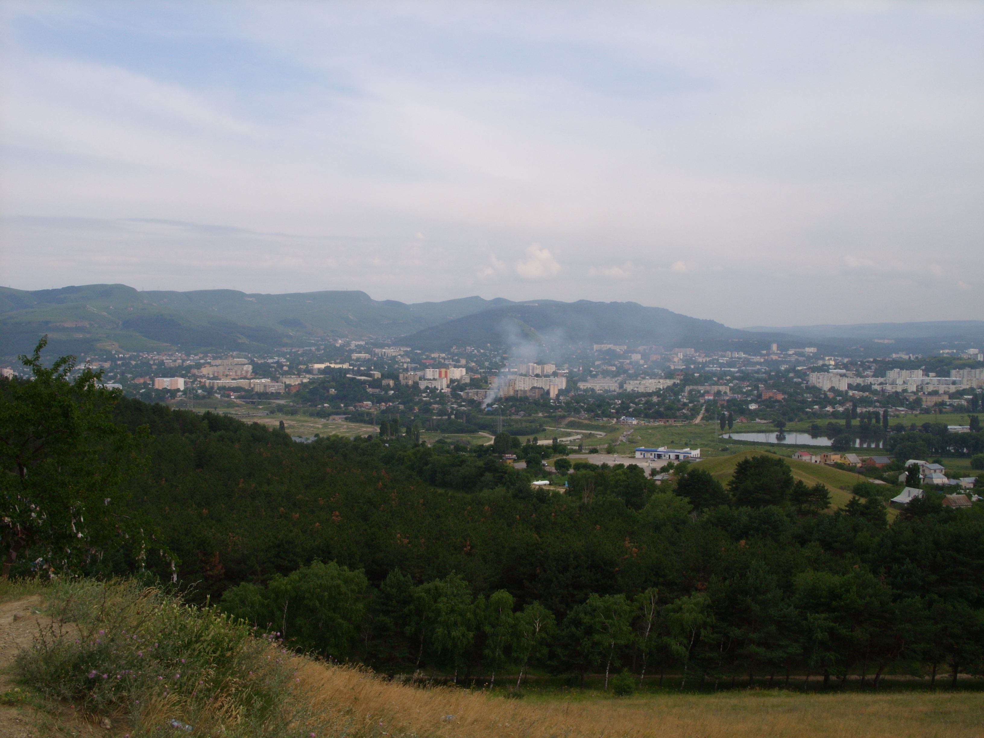 вблизи г. Кисловодска